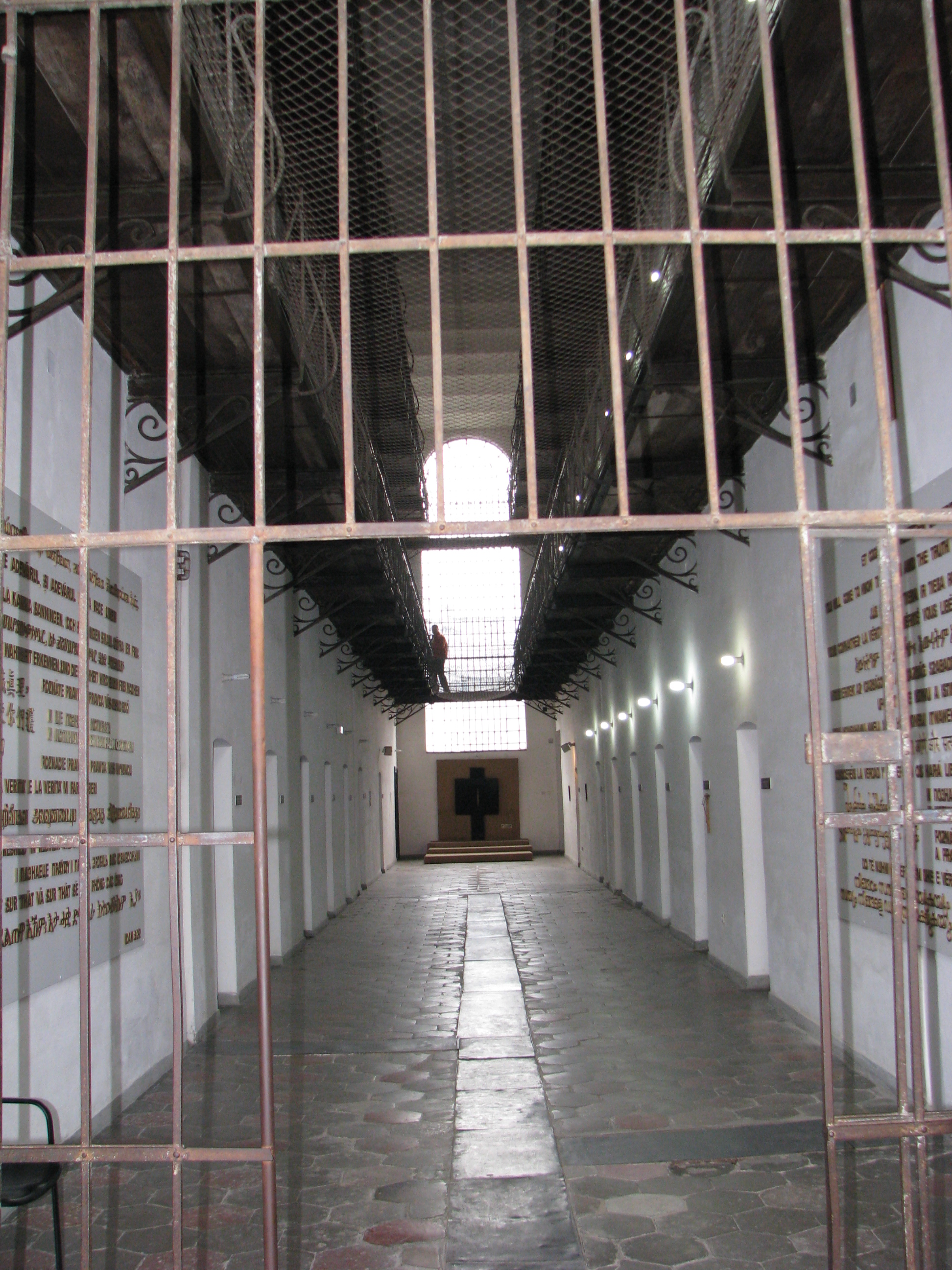 Închisoarea politică din Sighet, astăzi memorialul victimelor comunismului